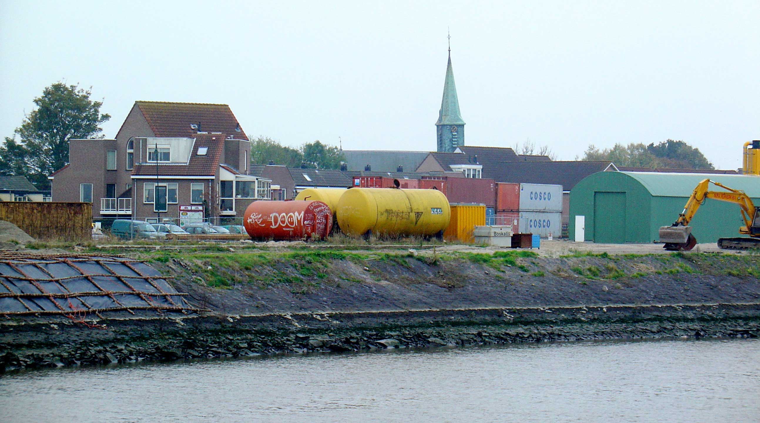 Zicht op Gouderak